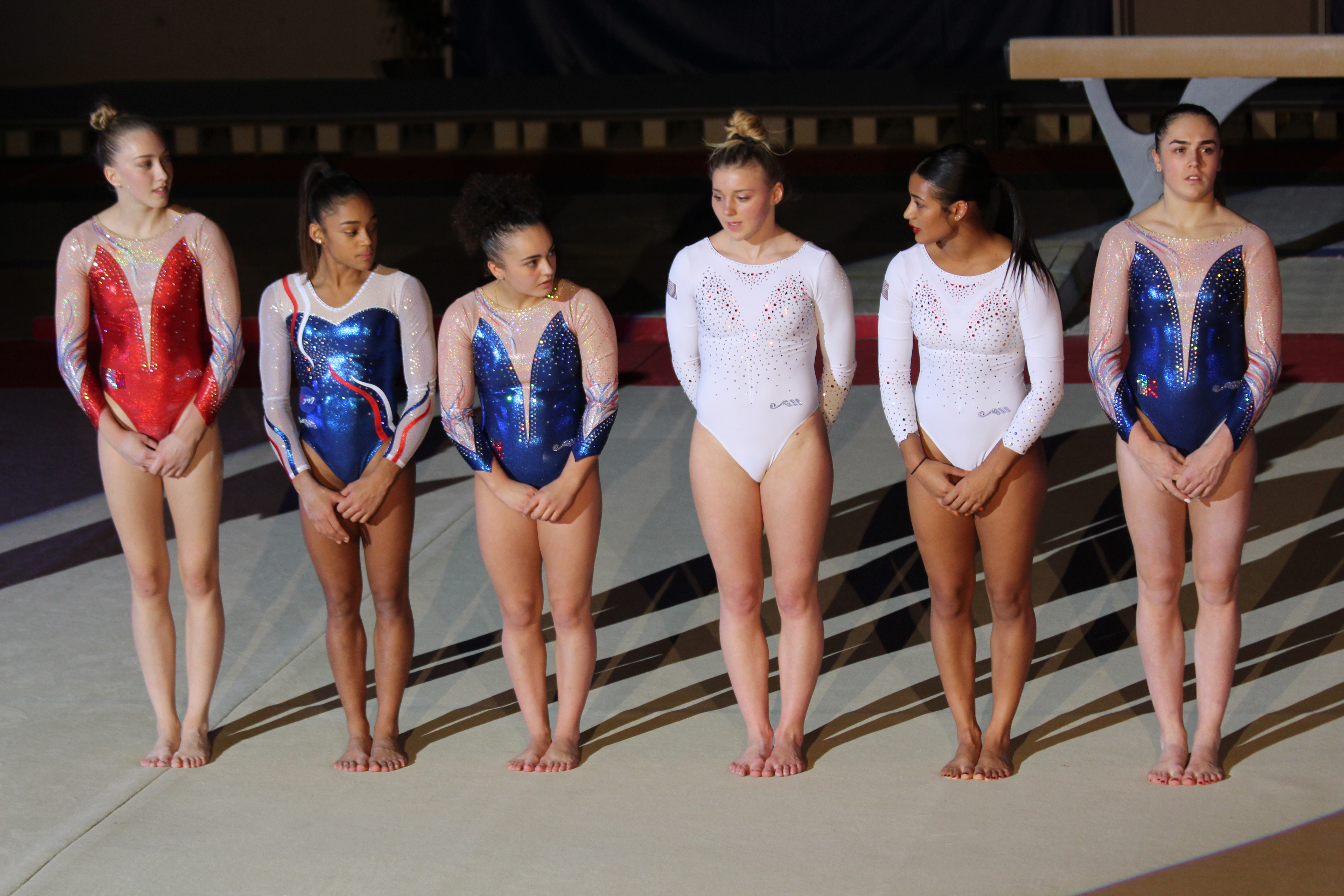 L'équipe de France de gymnastique artistique féminine lors du Sainté Gym Show 2018. De gauche à droite : Juliette Bossu, Mélanie de Jesus dos Santos, Coline Devillard, Lorette Charpy, Marine Boyer, Louise Vanhille.